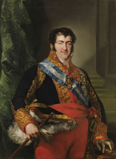 Retrato del rey Fernando VII de España (1784-1833), que era hijo del rey Carlos IV y de la reina María Luisa de Parma.